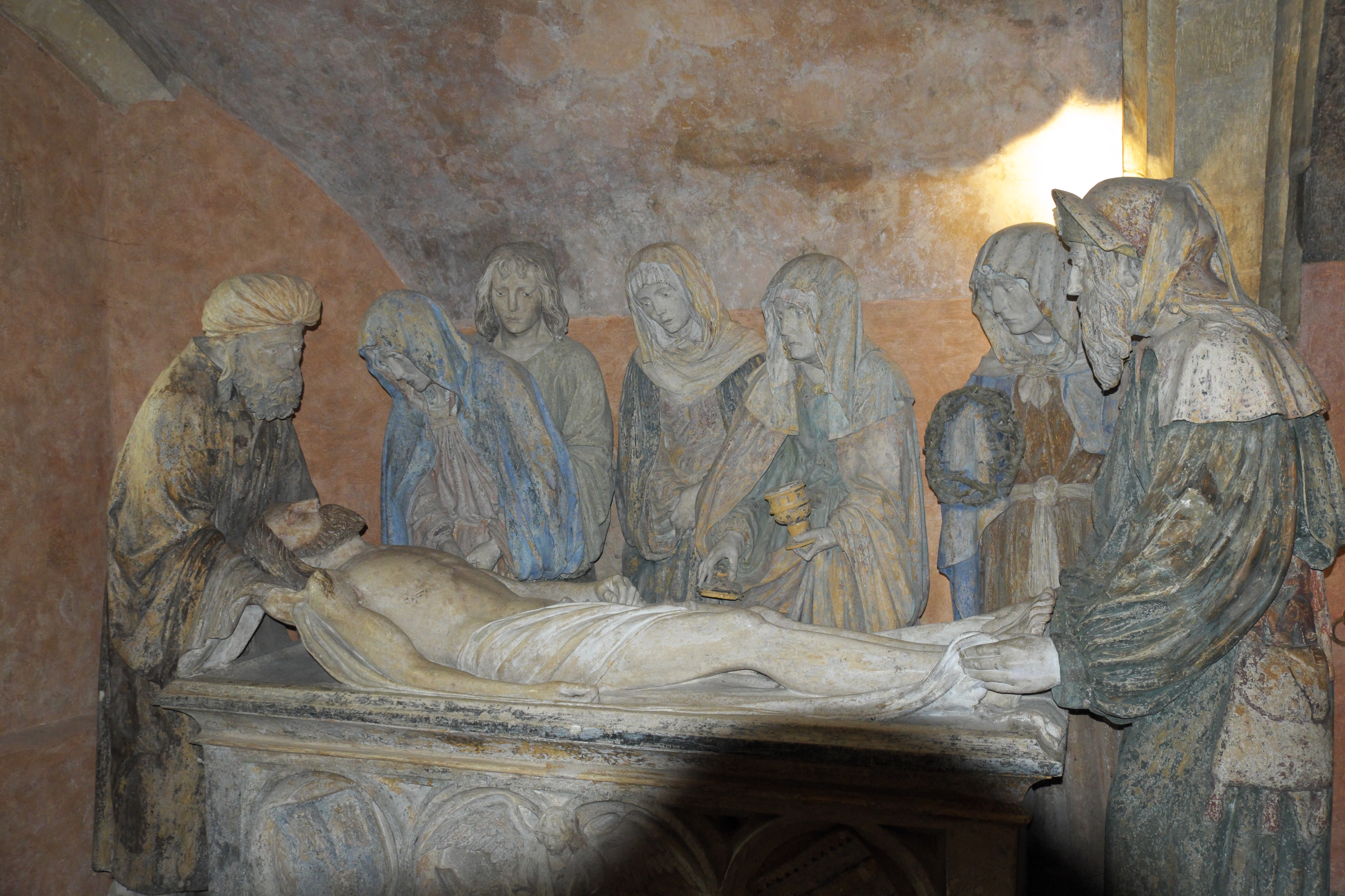 Kirche Saint-Jean-Baptiste in Chaource im Département Aube (Champagne-Ardenne/Frankreich), Grablegung des Meisters von Chaource, von 1515